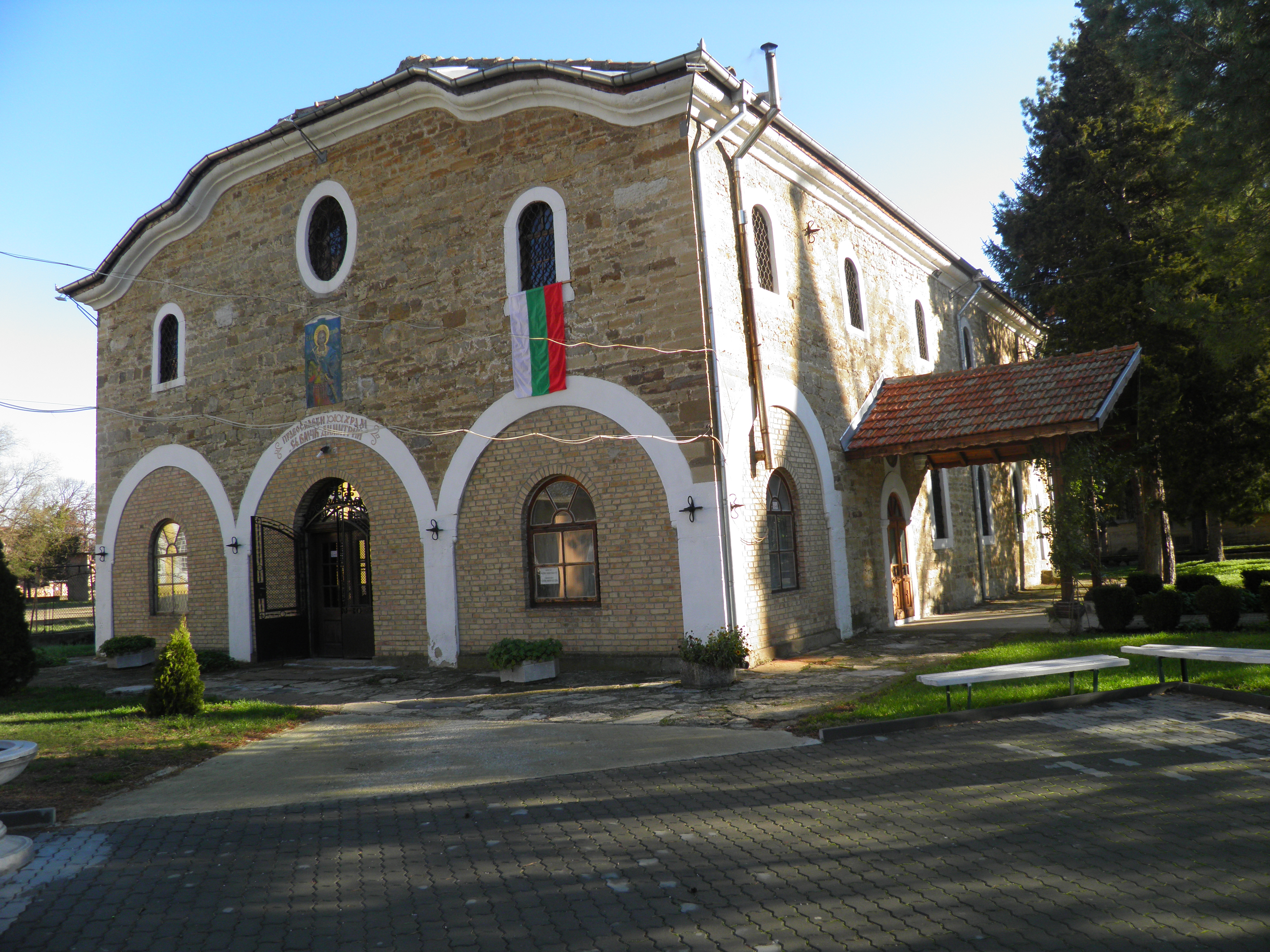 Църква „Свети Димитър“, Бяла черква